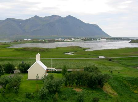 Borg, Egil Skallagrimssons farm